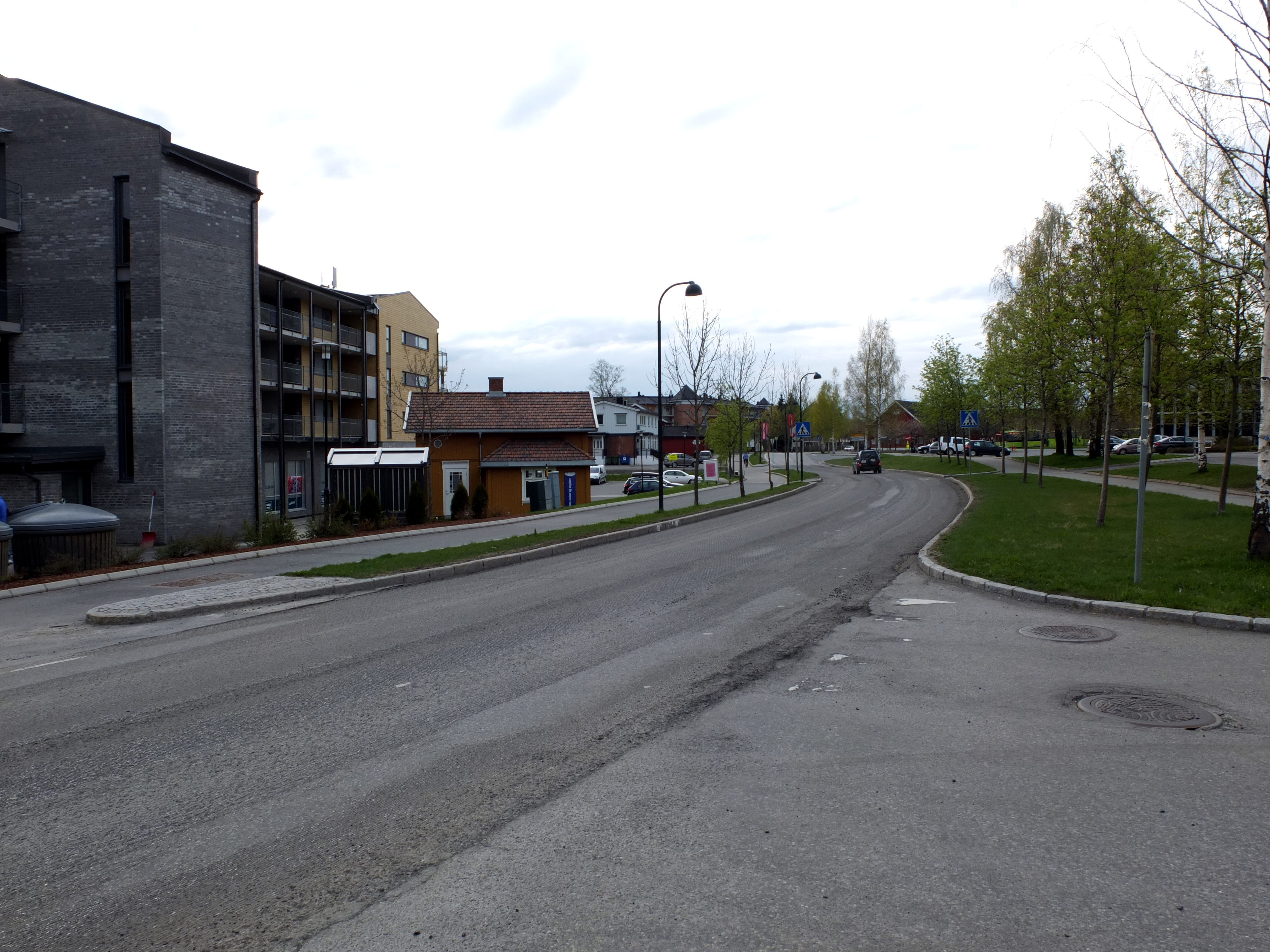 Ask i Gjerdrum